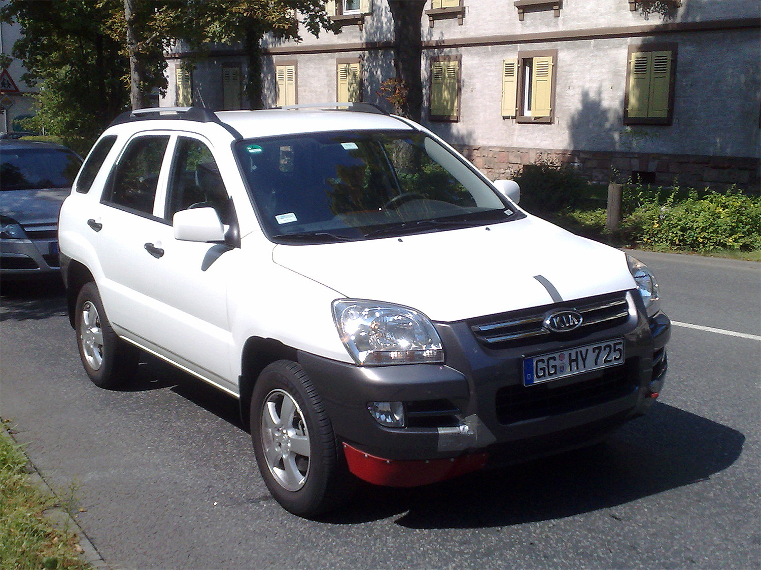 Kia Testwagen mit Sportage JE Karosserie